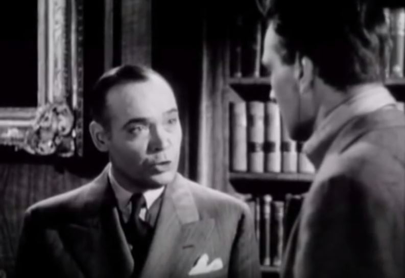 À gauche: Jacques Auger dans le film La Forteresse